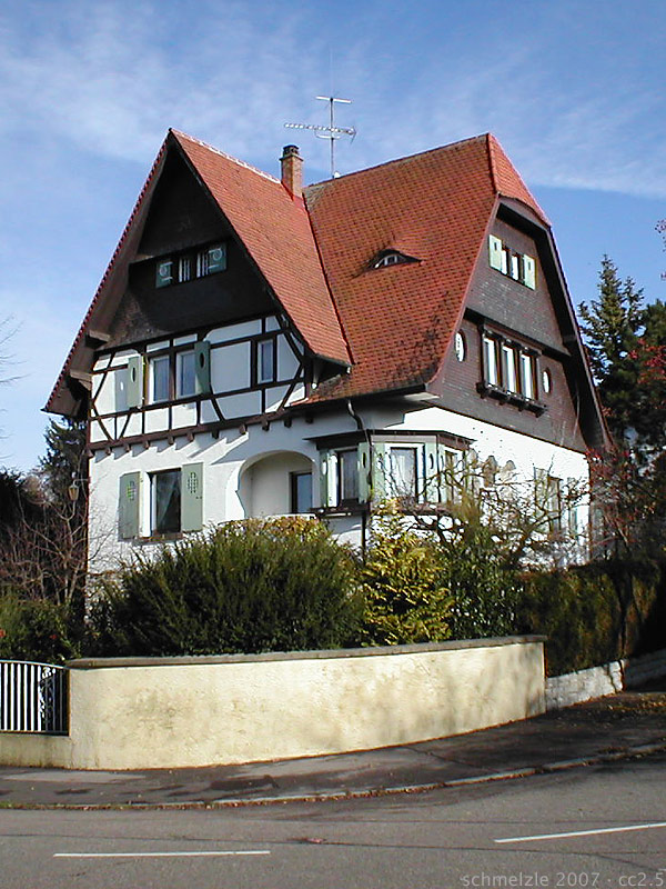 Villa Gutenbergstr. 63, Ecke Dittmar-/Gutenbergstraße, in Heilbronn